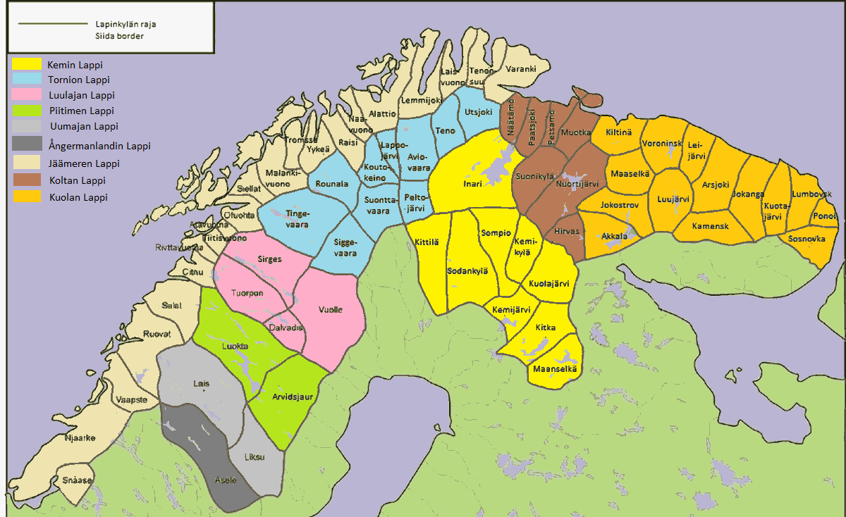 Lapinmaat.